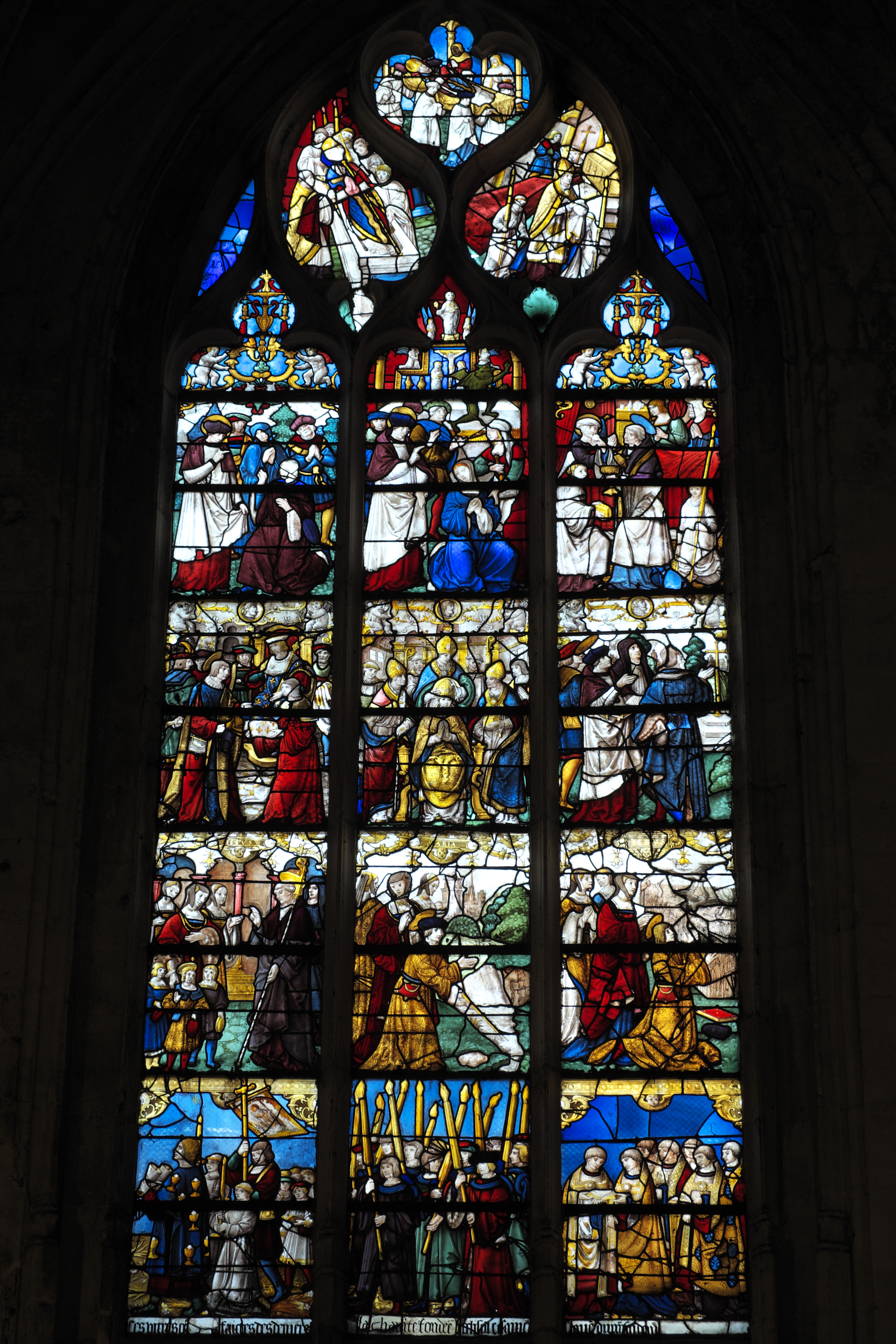 Katholische Kirche Saint-Ouen in Pont-Audemer im Département Eure (Haute-Normandie/Frankreich), Bleiglasfenster aus dem 16. Jahrhundert, Darstellung: Geschichte des hl. Audoenus (Saint Ouen)